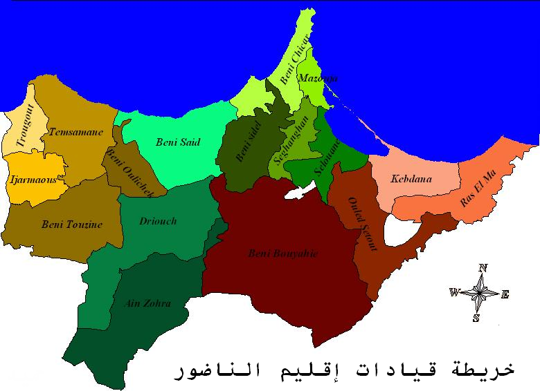 خريطة قيادات اقليم الناظور